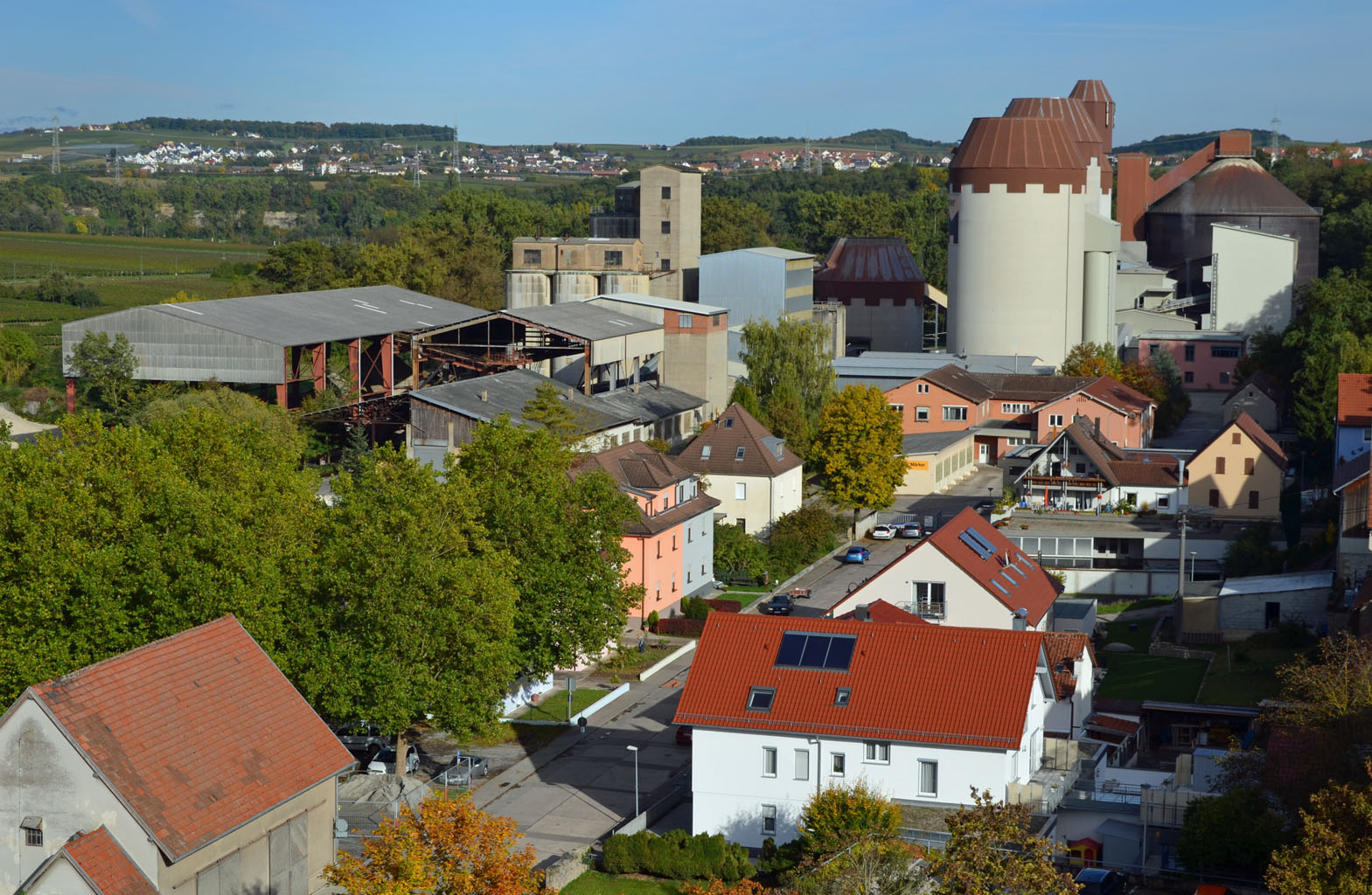 Lauffen am Neckar: Blick vom Bergfried der Grafenburg zum Märker-Zementwerk.